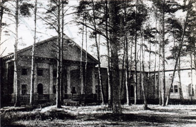 Несколько корпусов в один и два этажа построенные в Тюфелевой роще по общему замыслу И. В. Жолтовского. Проект 1916 года. Детальную разработку зданий ввели архитекторы Е. В. Шервинский и К. С. Мельников.